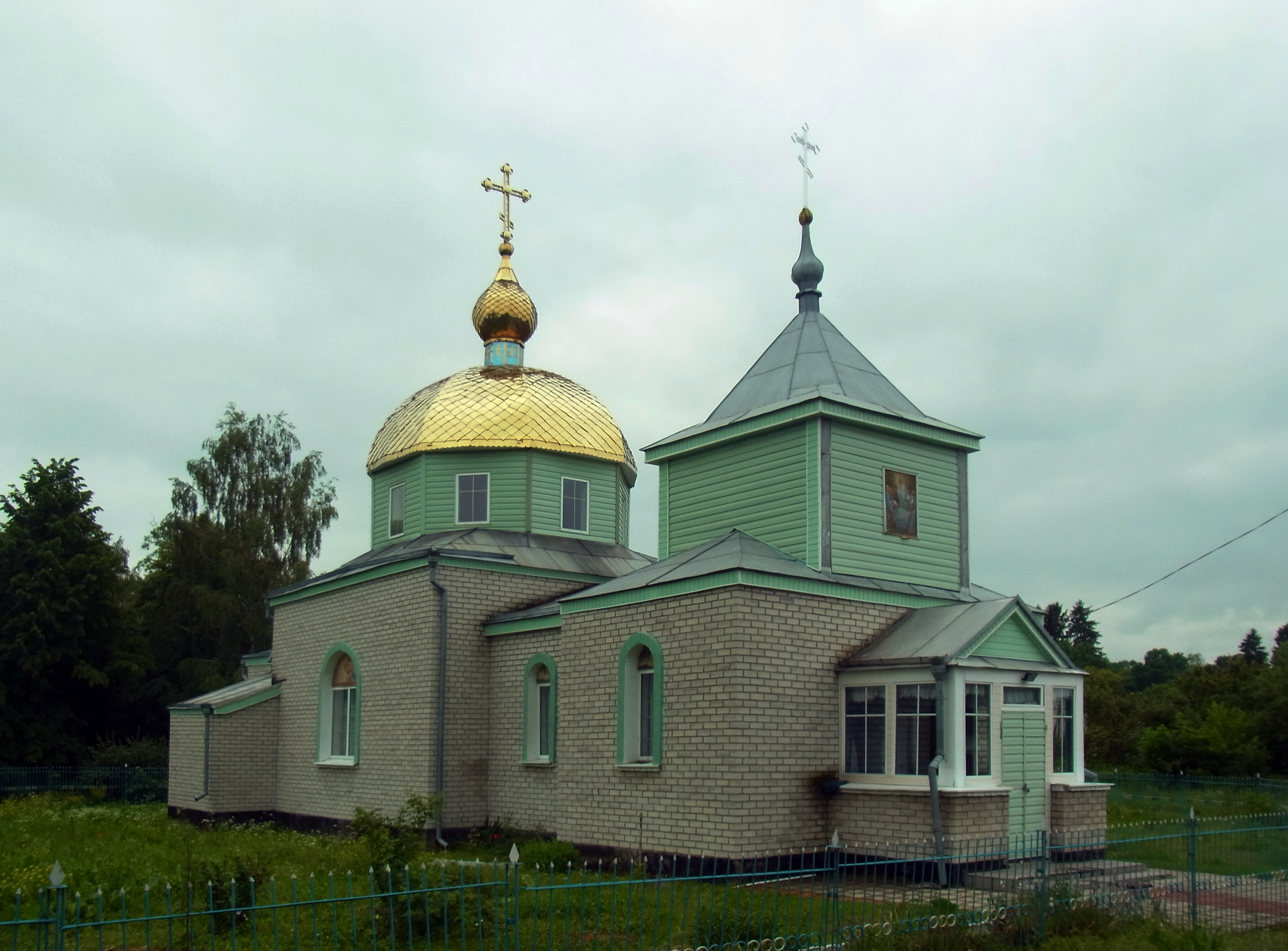 Успенська церква (дер.) (1767-1881 роки) - вигляд з північного сходу - с.Перевали Турійський район Волинська область Україна